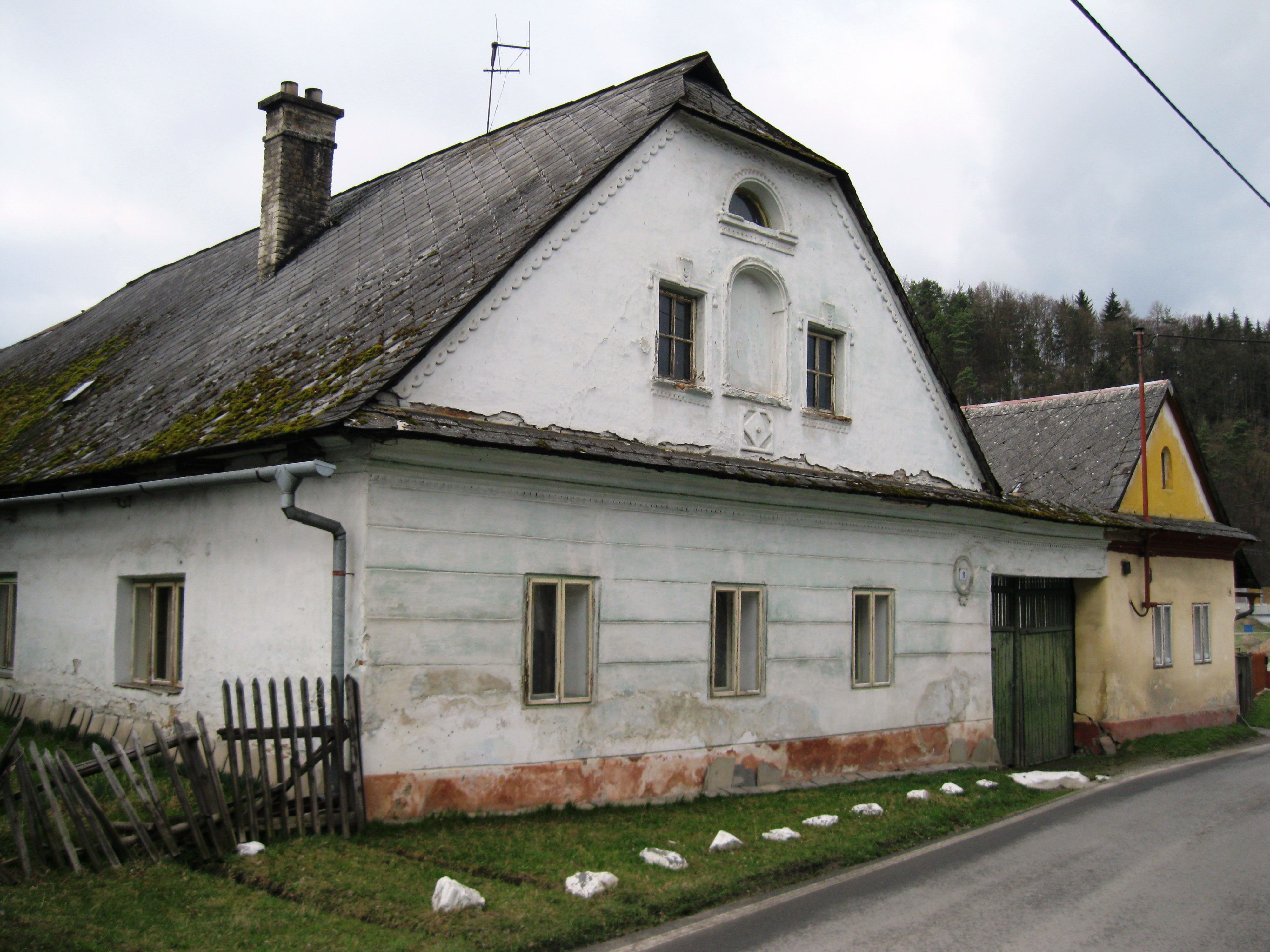 Venkovská usedlost (Lupěné), Lupěné 11